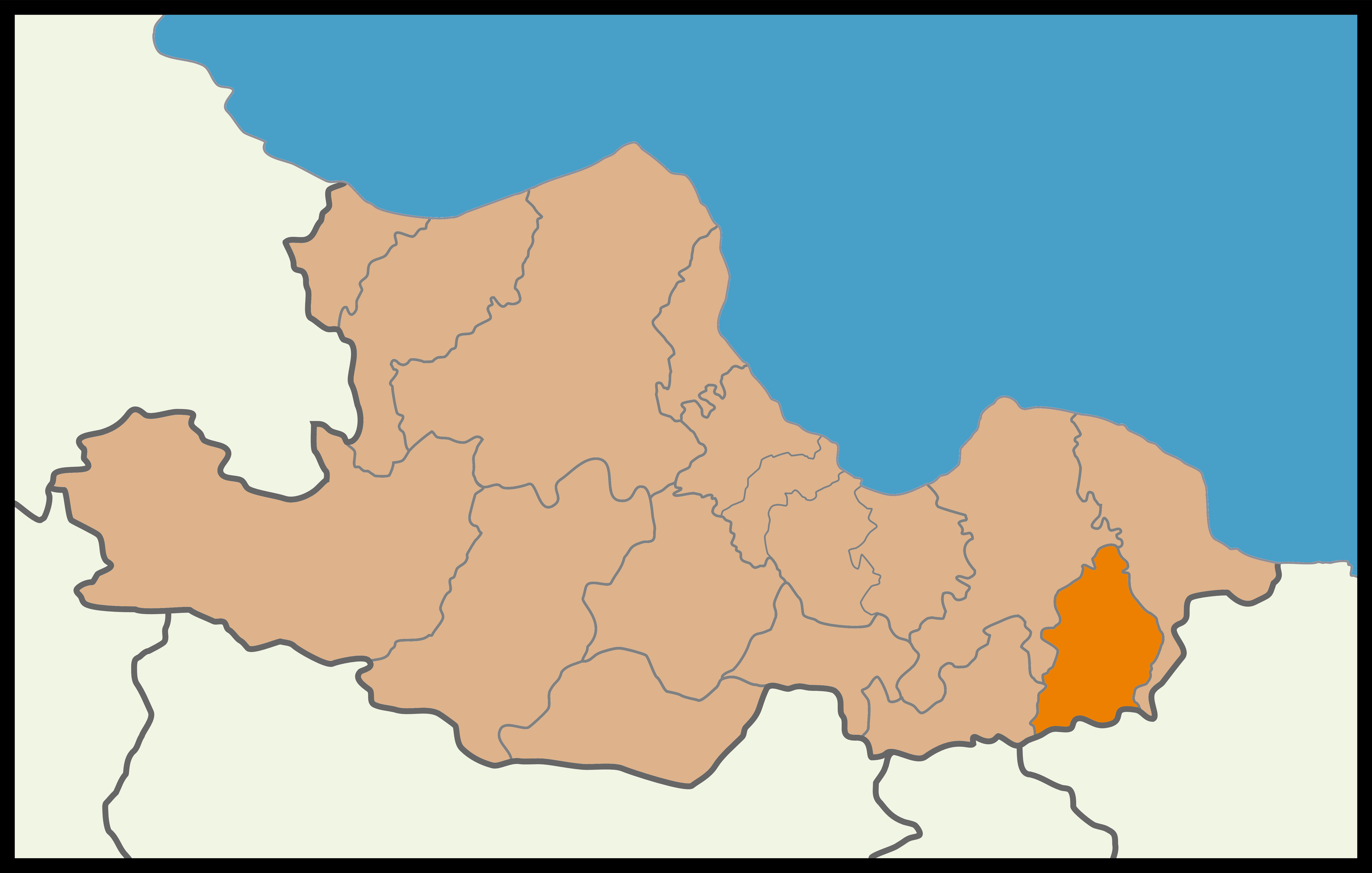 Samsun'un Salıpazarı ilçesinin 2015 Türkiye genel seçimleri haritası.